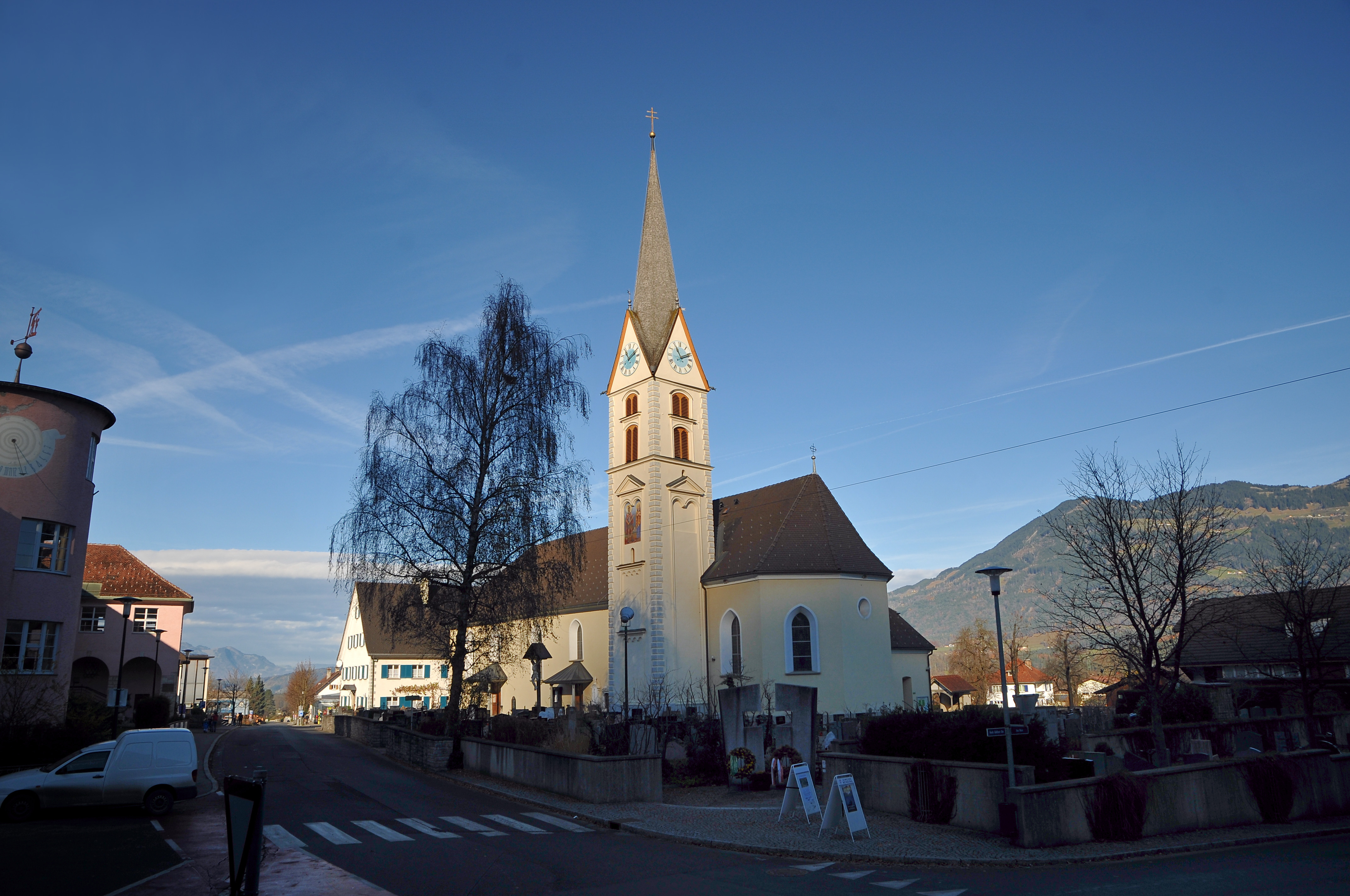 Pfarrkirche Hl. Mauritius in Nenzing. Mayer Orgel 1912 mit 17 Register.